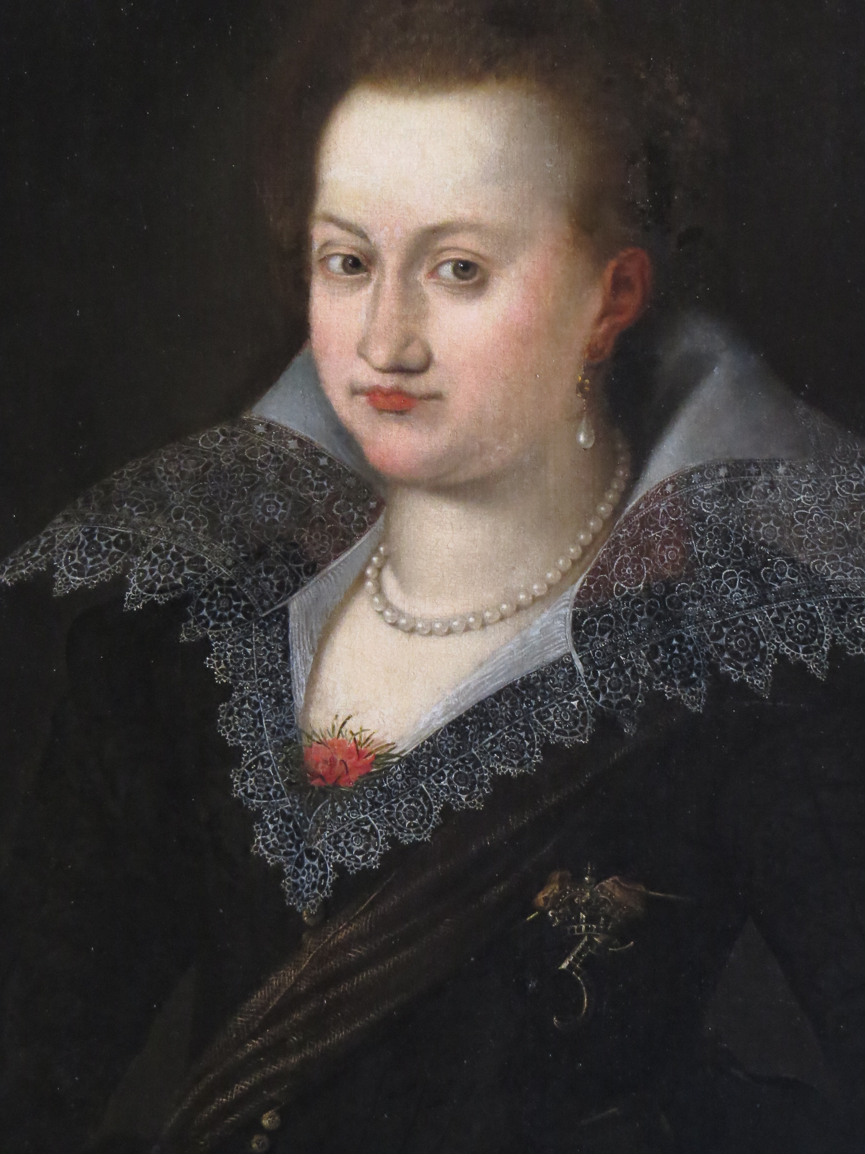 Detalje fra maleri af prinsesse Hedevig af Danmark og Norge (1581-1641), Frederiksborg Slot, Sjælland